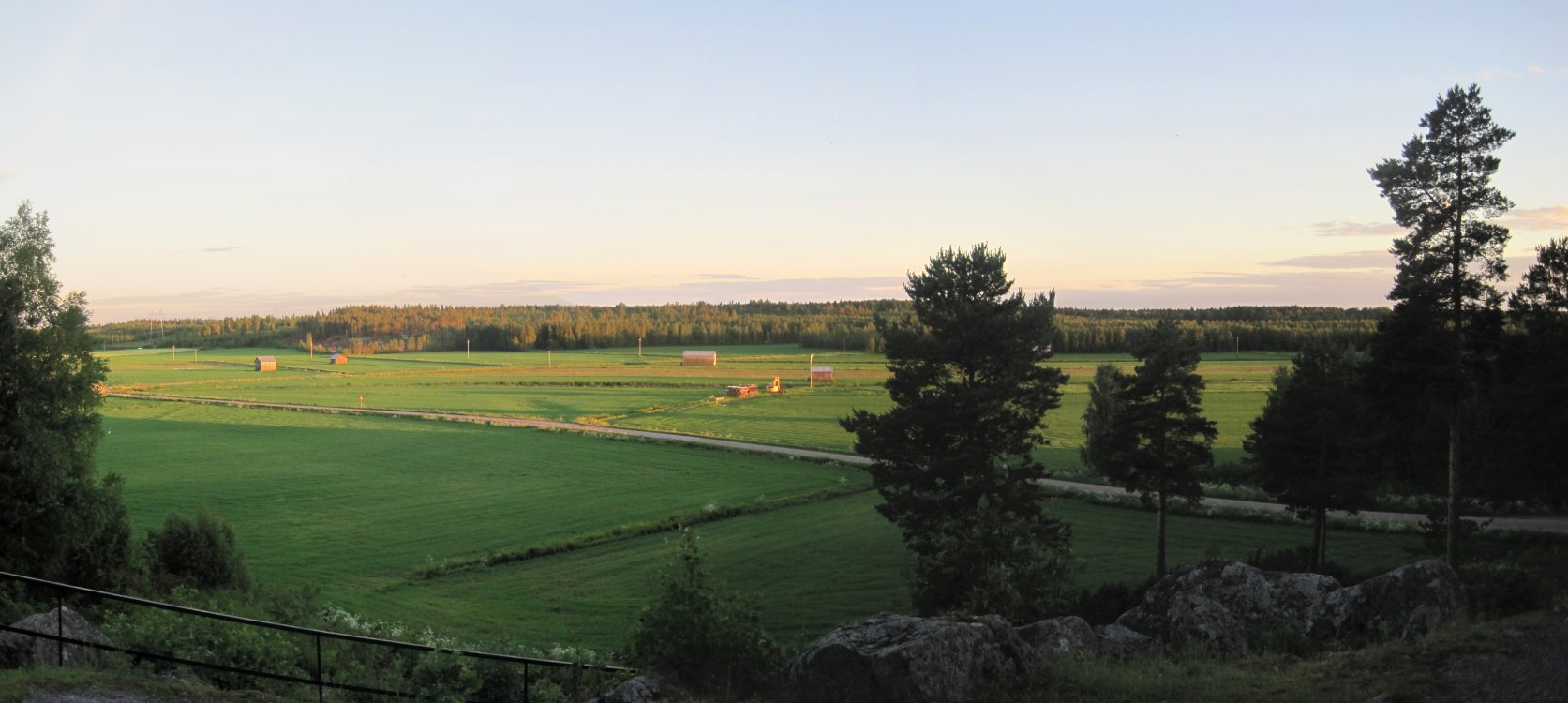 Oravaisen taistelutanner kesällä 2016, näkymä Karlsbergetin kalliolta (panoraama)